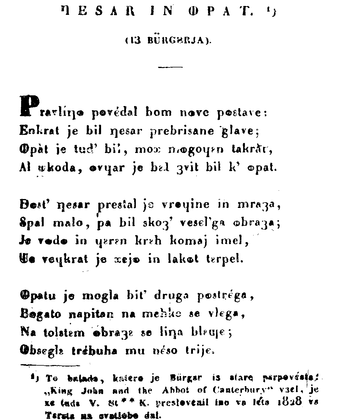 Fragment of "Cesar in opat", metelčica